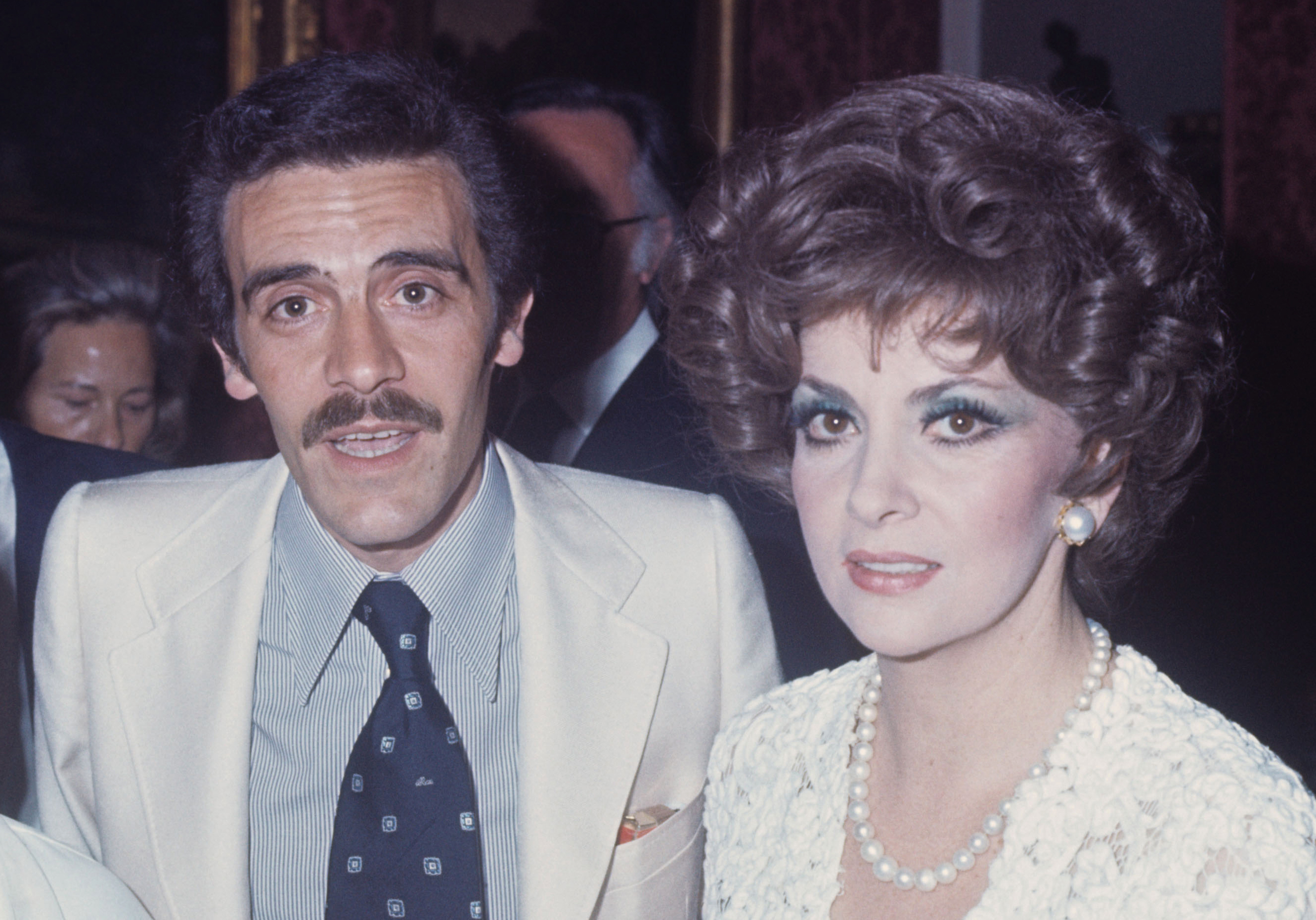 Barillari Rino, Archivio Barillari Story, negativo a colori